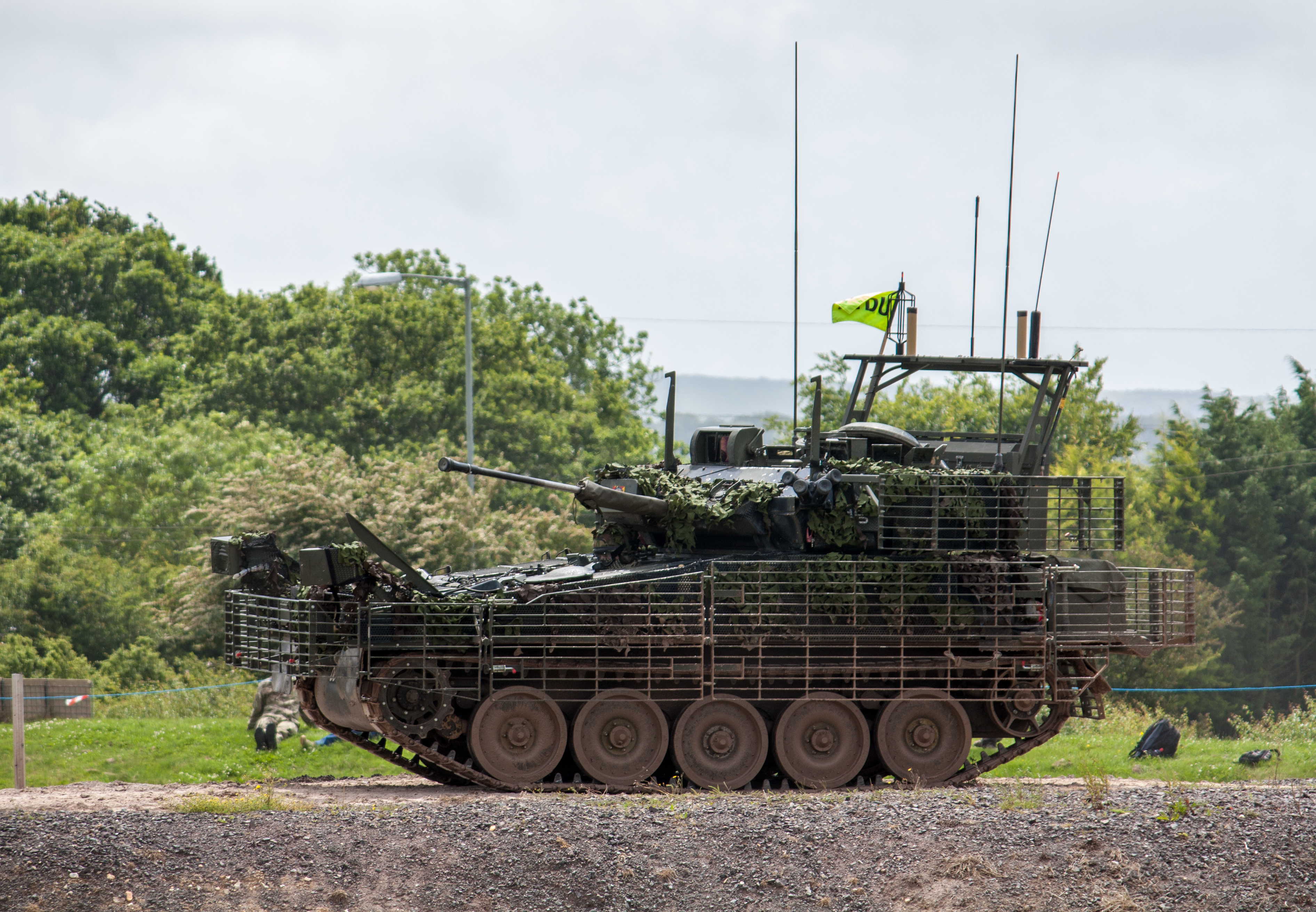 Scimitar ARV